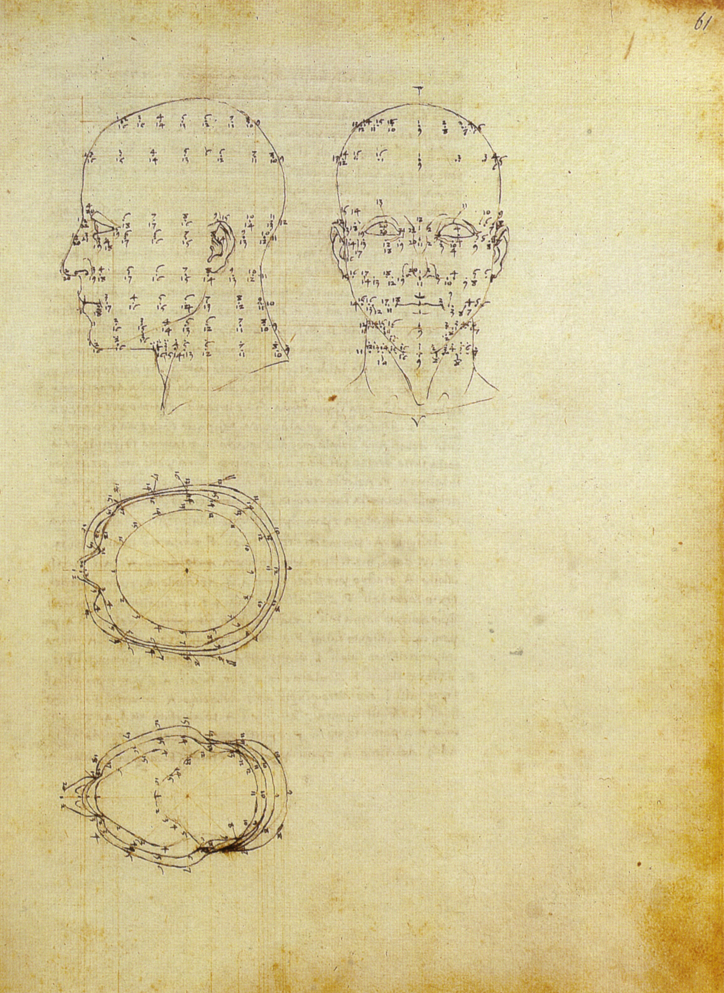 Piero, proiezioni di una testa scorciata dal de prospectiva pingendi, ante 1482, milano, biblioteca ambrosiana